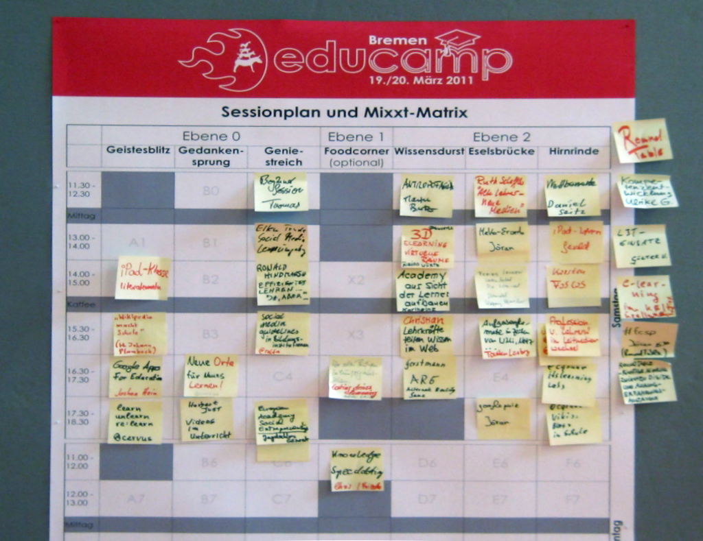 Sessionplan (Grid) für den ersten Veranstaltungstag beim EduCamp 2011 #7 an der Universität in Bremen (Deutschland). Die von verschiedenen EduCamp-Teilnehmern in der Vorstellungsrunde angebotenen Themen werden im Sessionsplan auf Zeiten und Räumlichkeiten verteilt. Der fertige Sessionsplan wird unmittelbar nach Erstellung als Foto-Ausdruck an jeden Teilnehmer ausgehändigt.